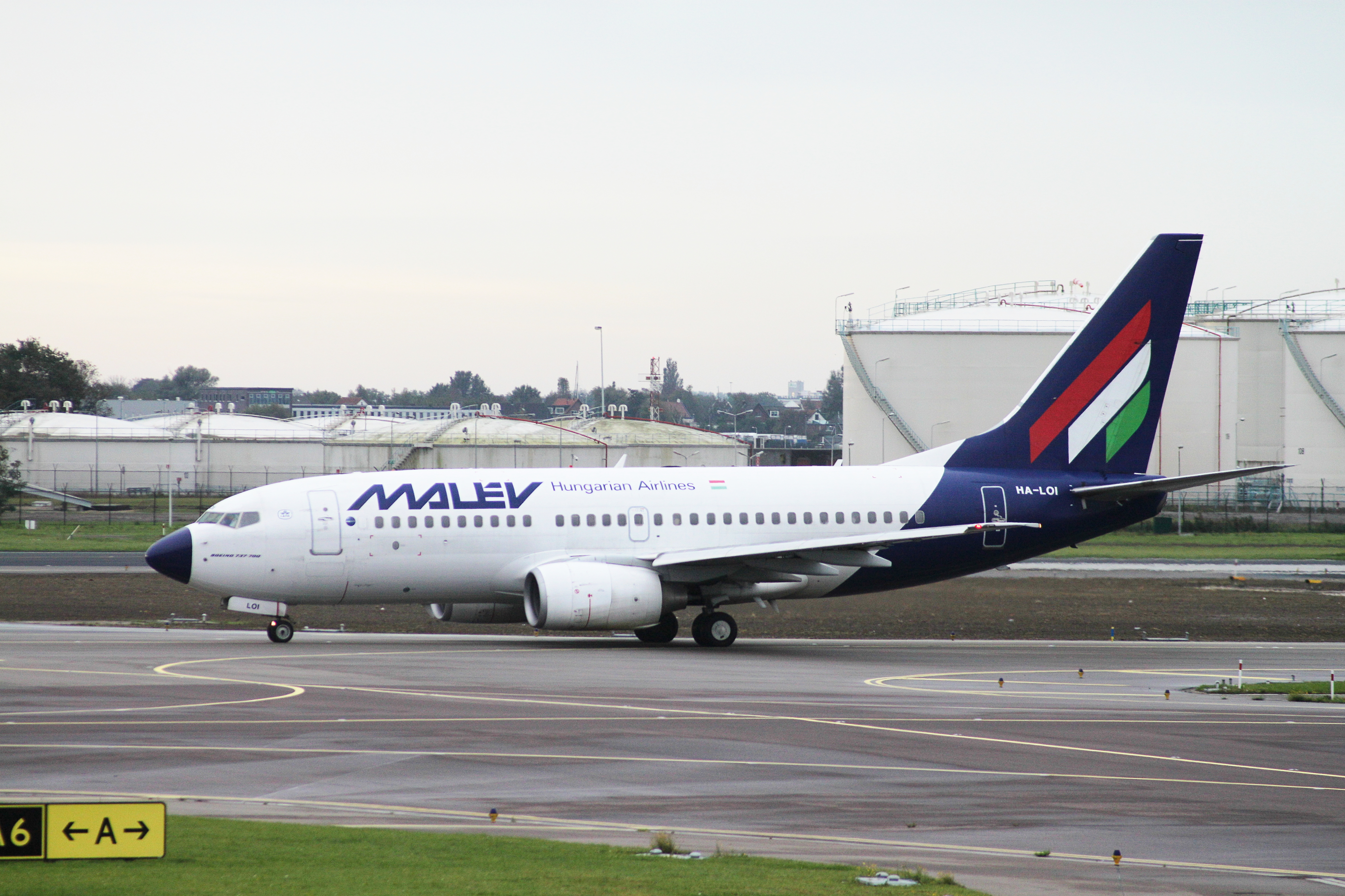 Flughafen Schiphol, Amsterdam